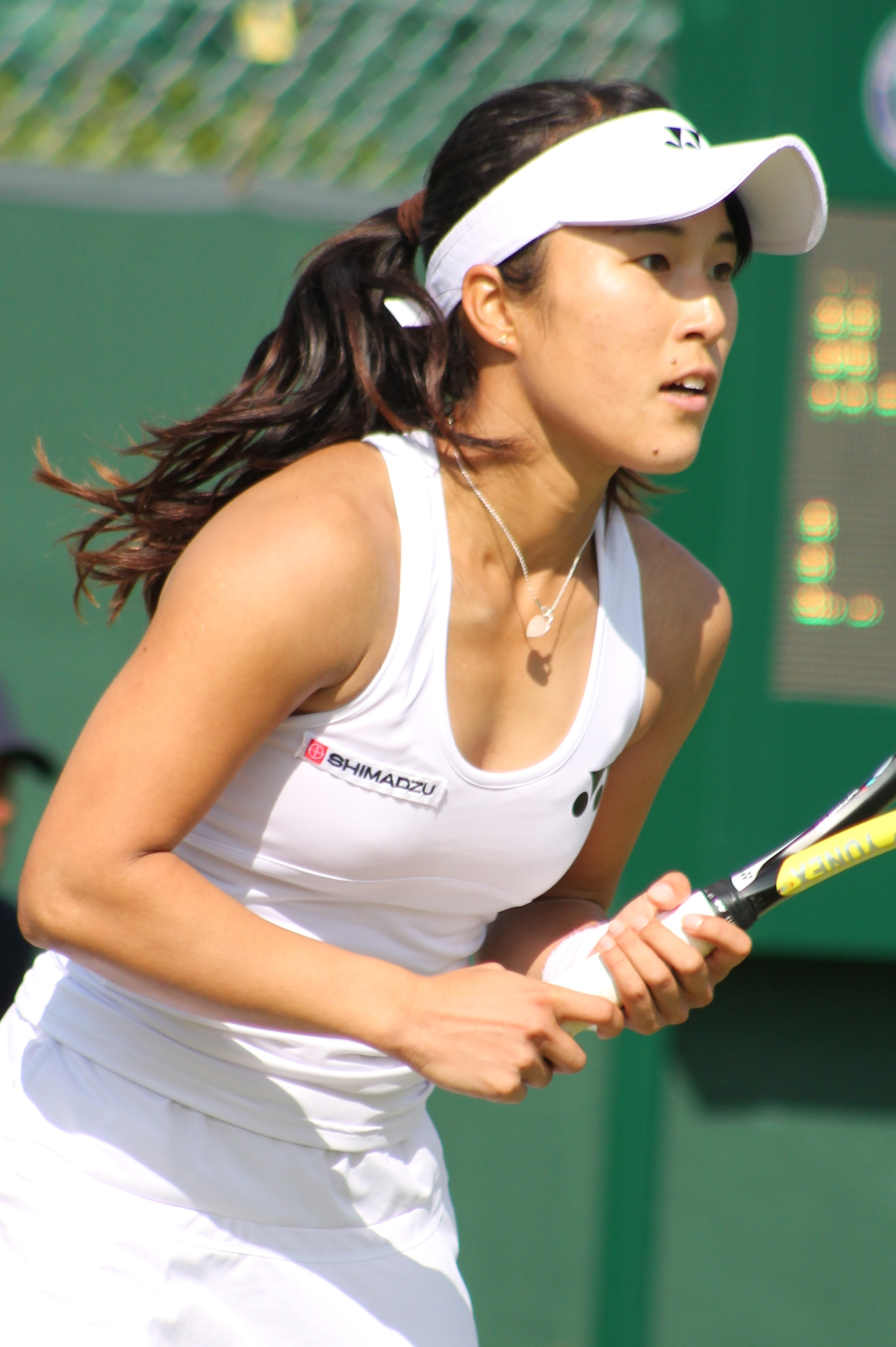 Kuwata WMQ15 (3)